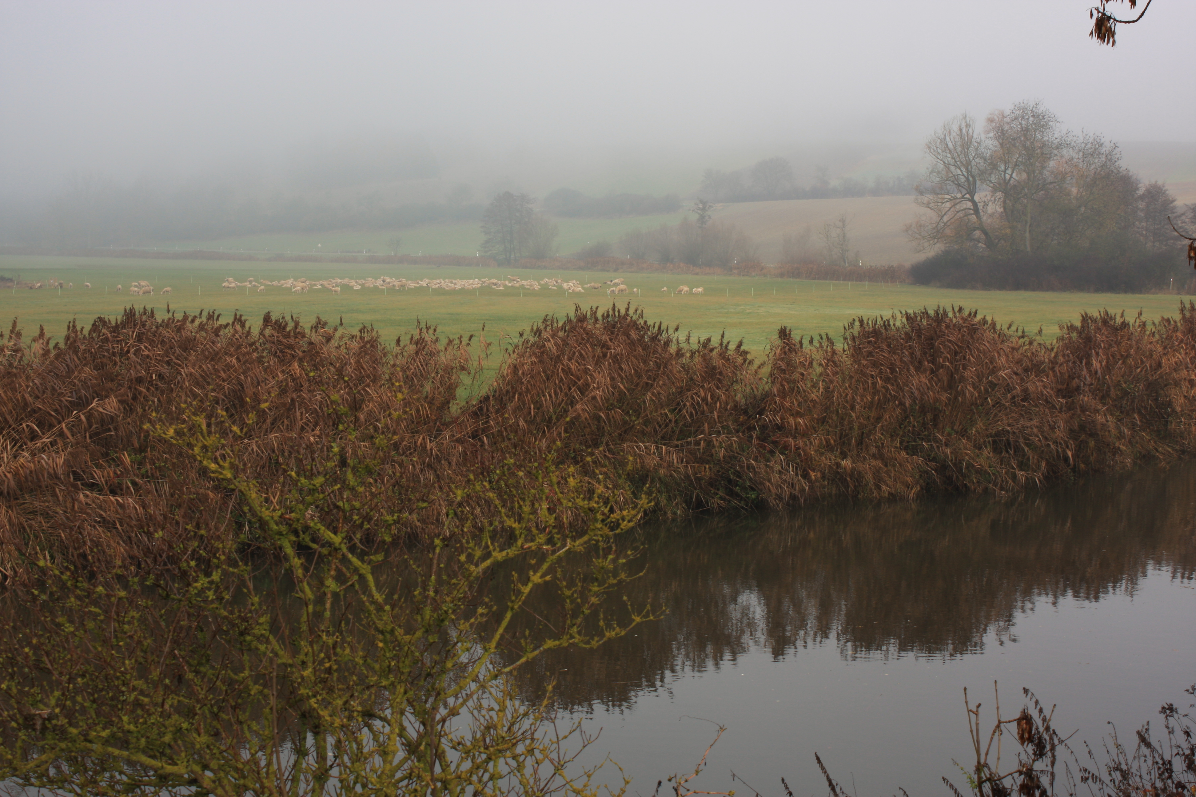 Das Priel ist die größte Jura-Karstquelle Schwabens in der Wörnitzschleife bei Ebermergen mit umgebenden Feuchtwiesen nebst Röhricht- und Buschbeständen.